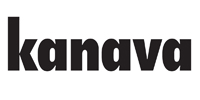 Kanavalehden logo " Otavamedia"